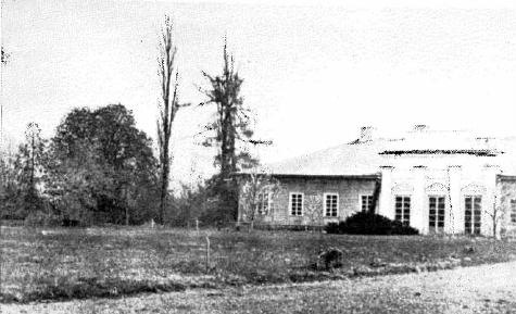 Беларуская (тарашкевіца): Маёнтка Чачотаў у Задзьвеі